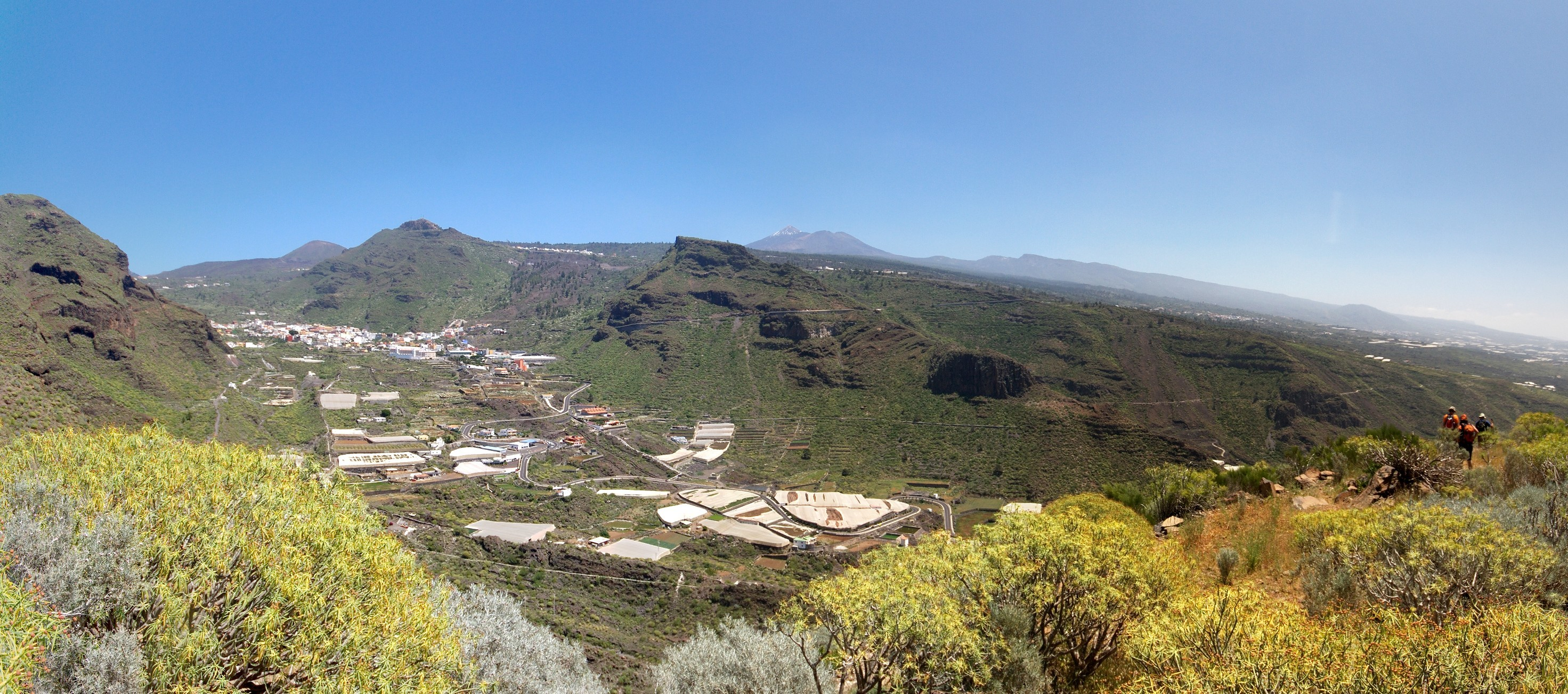 Vista de Tamaimo